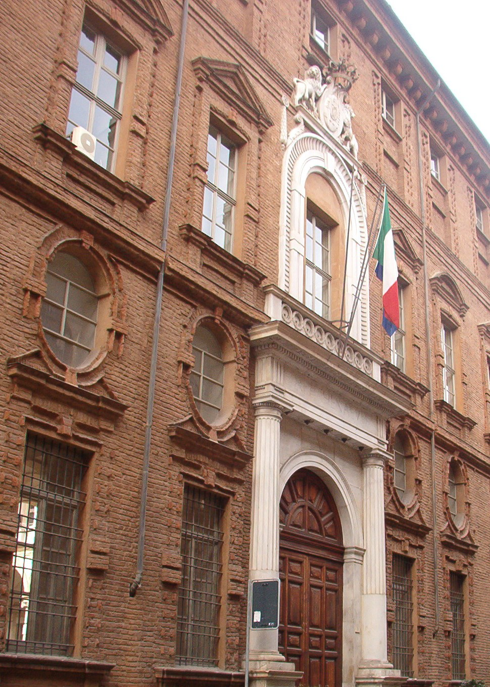 Portale Palazzo dell'università - Torino - Italia